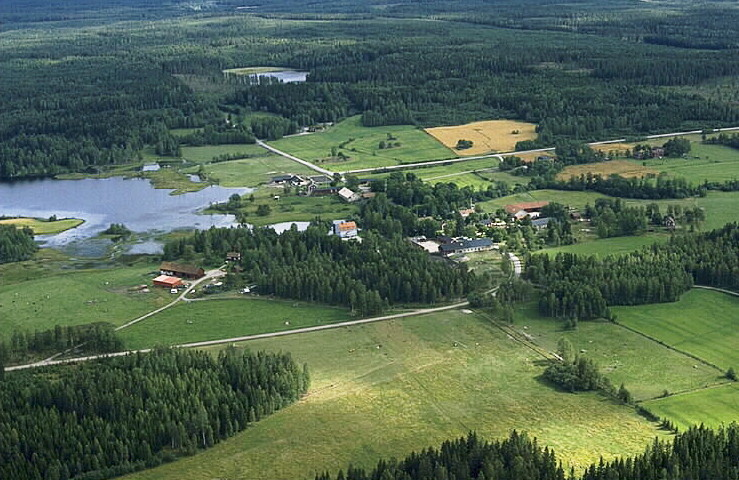 Flygfoto över Olsbenning